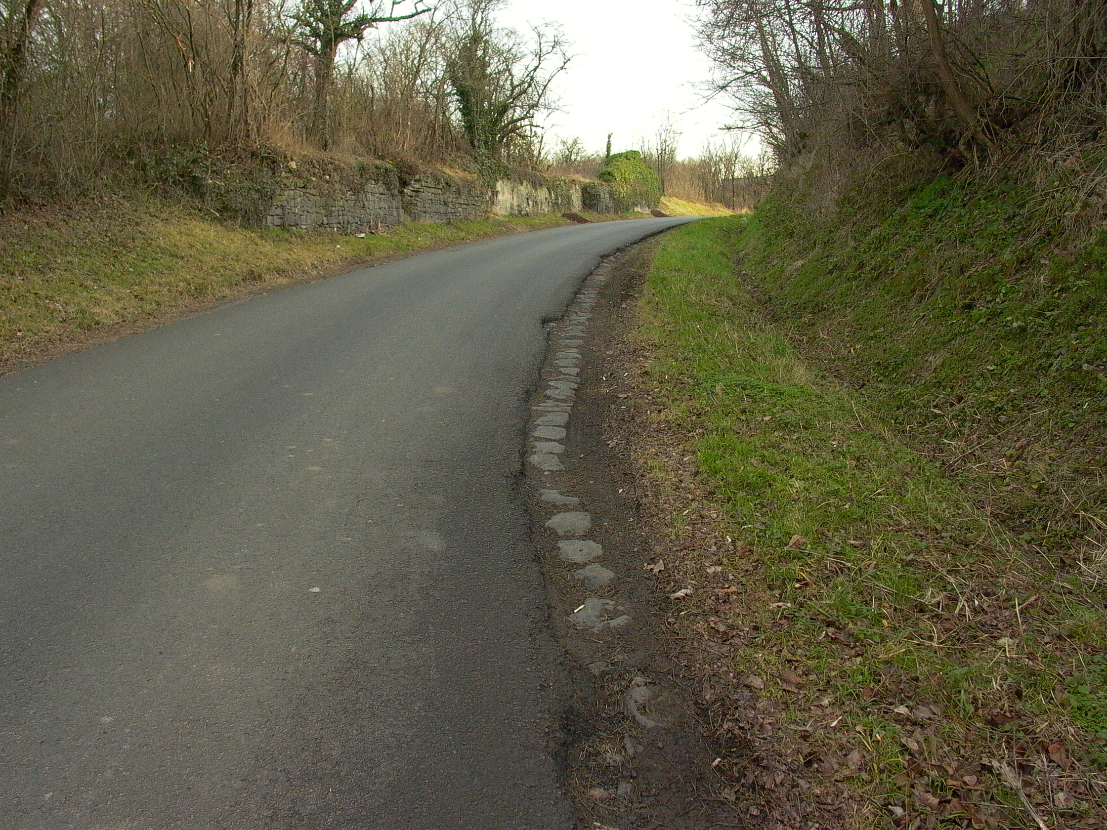 Restes de pavés à côté du goudron : présence à Mozac de l'ancienne voie romaine entre Augustonemetum et Avaricum. Localisation : chemin de la Font-Barras. La route fait limite entre les communes de Mozac et de Riom. Les pavés sont du côté de la commune de Mozac (ouest).